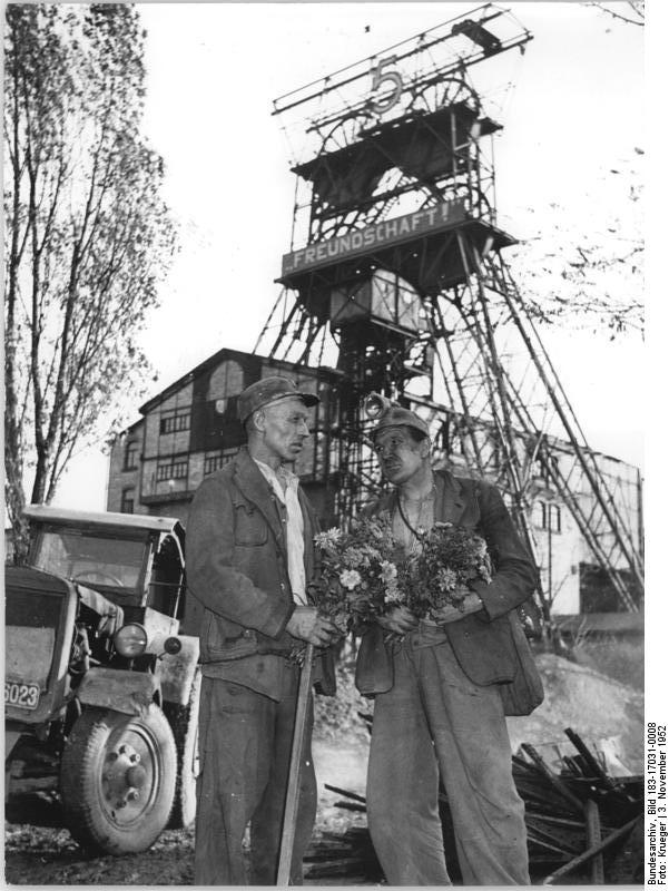 Bergarbeiter mit Blumenstrauss, Förderturm Zentralbild Krueger 3.11.1952 Erste Komplexbrigade in der Kupfererzgewinnung (Mansfeldkombinat "Wilhelm Pieck"). Am 1.November 1952 fuhr die erste Komplexbrigade in der Kupfergewinnung, die Brigade "XIX. Parteitag", im Otto-Brosowski-Schacht des Mansfeldkombinats "Wilhelm Pieck" als Auftakt zum Monat der Deutsch-Sowjetischen Freundschaft ihre erste Schicht und erreichte eine Planerfüllung von 11,7%. Nach Beendigung der Schicht fand eine kurze Feierstunde statt, in der Komplexbrigadier Adolf Taraba und der stellvertretende Werkleiter Stenzel den Komplexbrigadevertrag unterschrieben. Die Komplexbrigade "XIX. Parteitag", die auf Initiative des Komplexsteigers Otto Sonnabend gebildet wurde, setzt sich aus den bisherigen Brigaden des Flügels 5-II, einschließlich der Schiesser, Handwerker und Förderleute zusammen. UBz: Der Initiator der Komplexbrigade, Steiger Otto Sonnabend. (Im Hintergrund) die Otto-Brosowski-Schachtanlage.